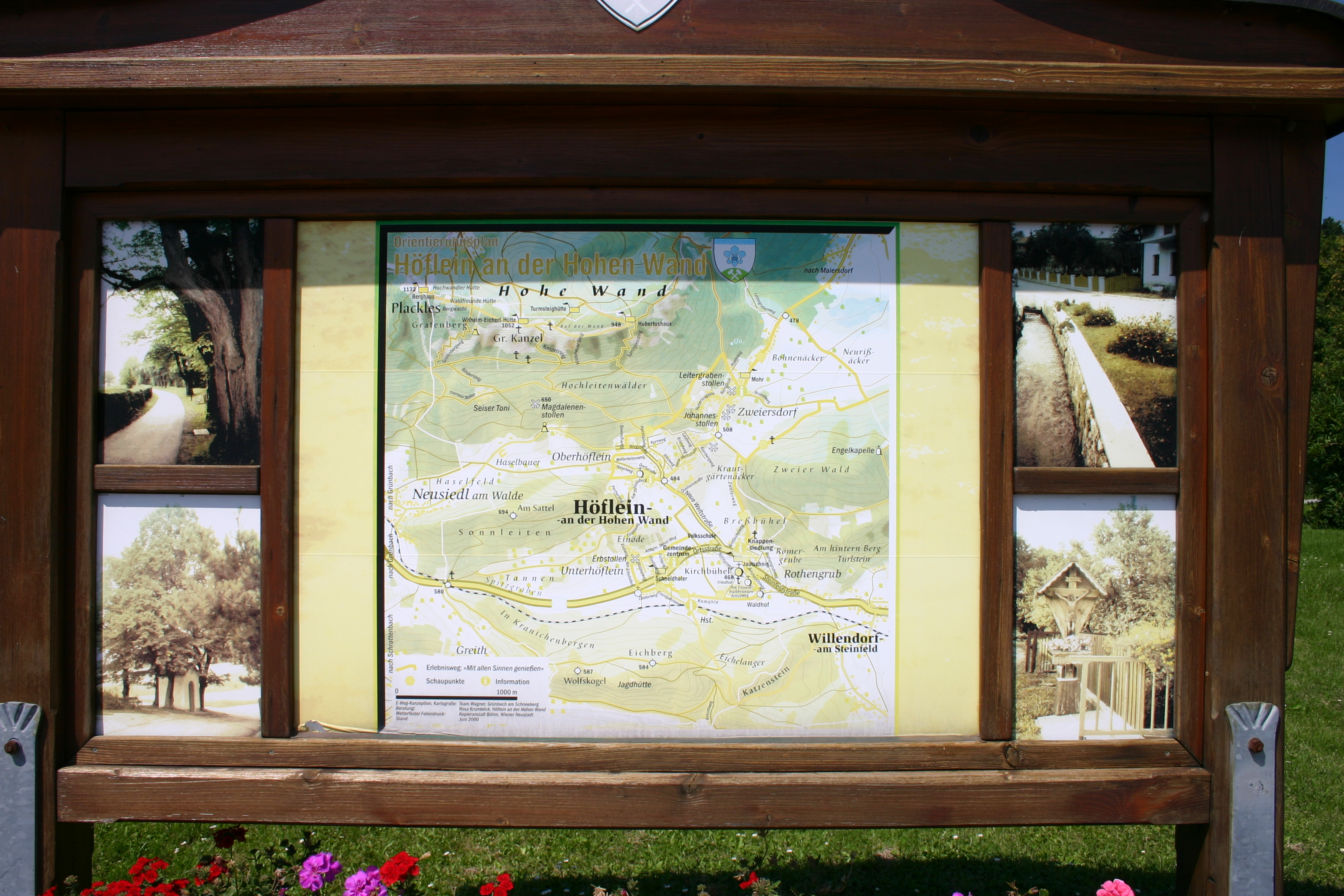 Höflein an der Hohen Wand Übersichtskarte